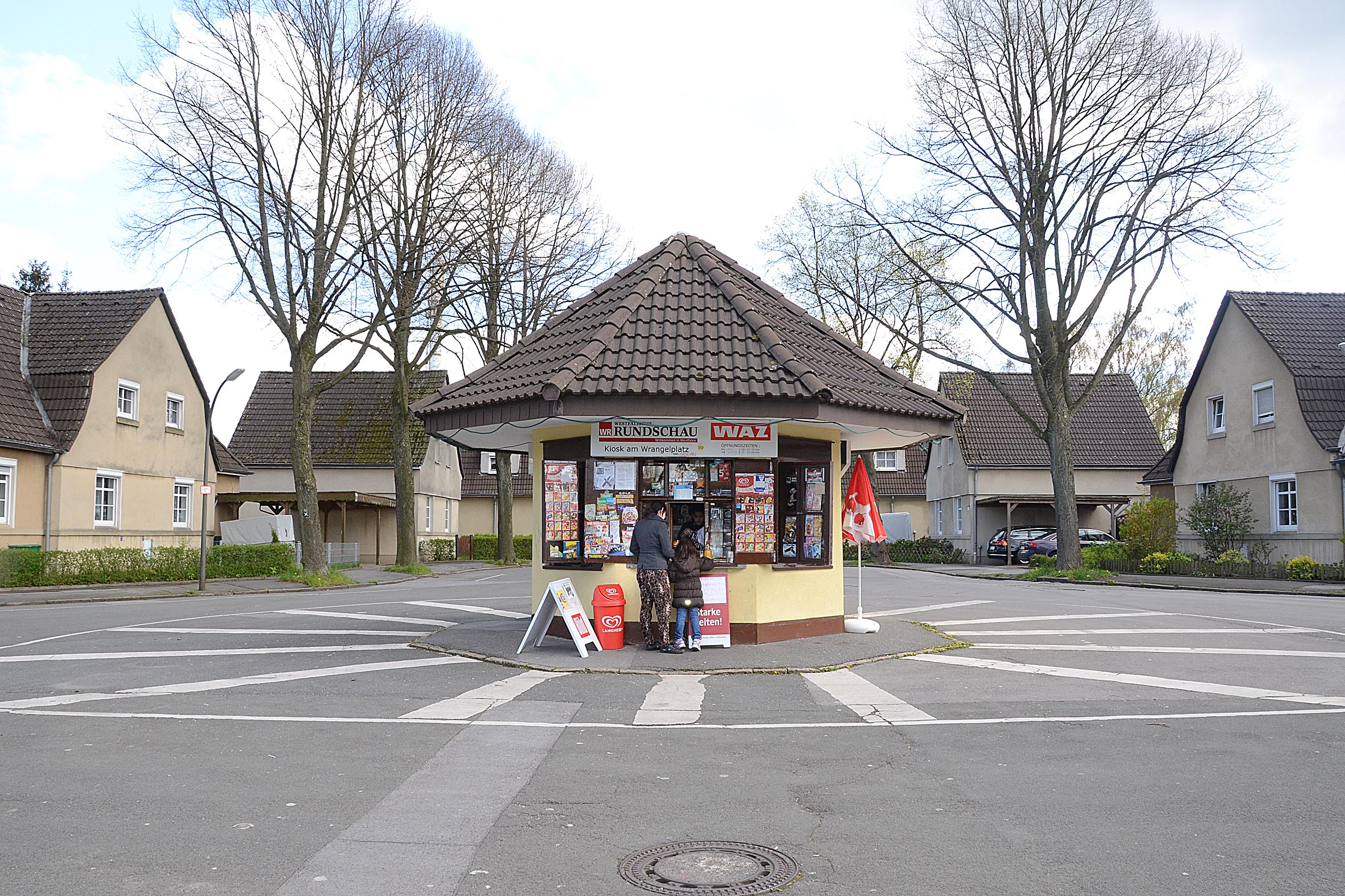 Kolonie Kirdorf: Kiosk auf dem Wrangelplatz in Dortmund-Eving